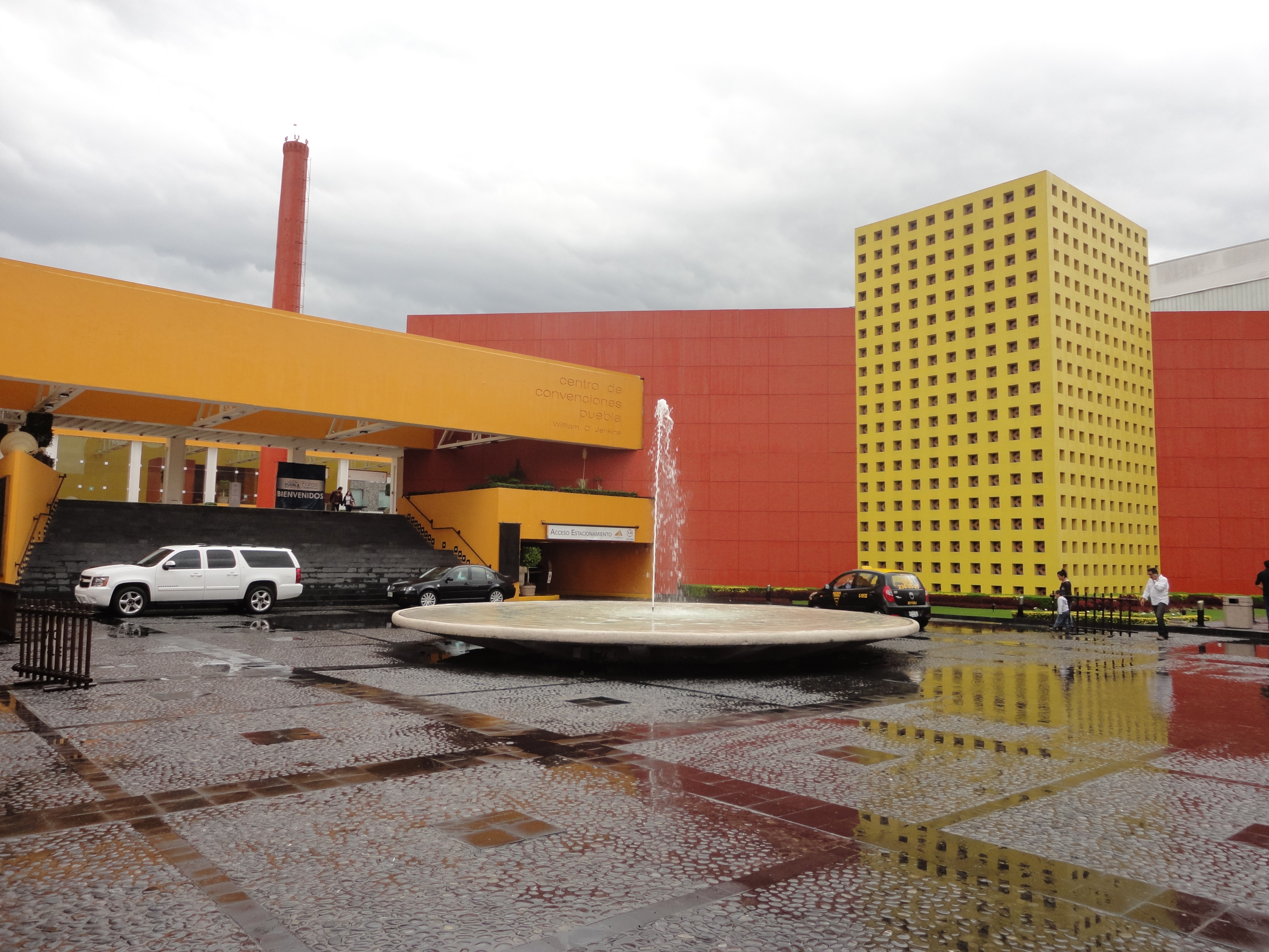 Entrada principal del Centro de Convenciones